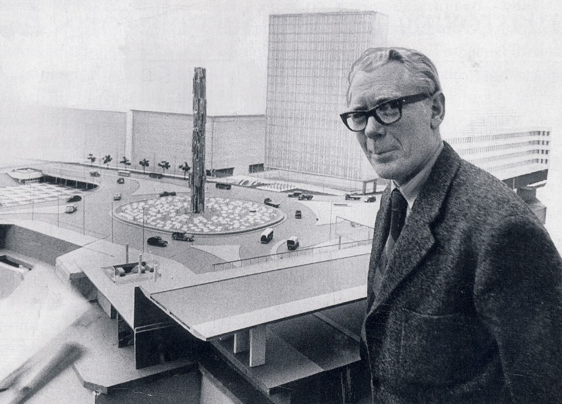 Edvin Öhrström framför modellen för "Kristall, vertikal accent i glas och stål" (glasobelisken) i Stockholm.